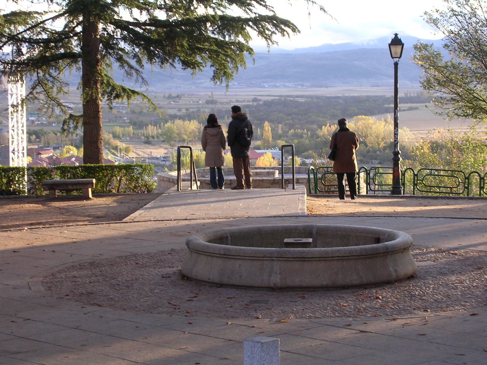 El valle de Amblés desde el jardín del Rastro. Por Zósimo.